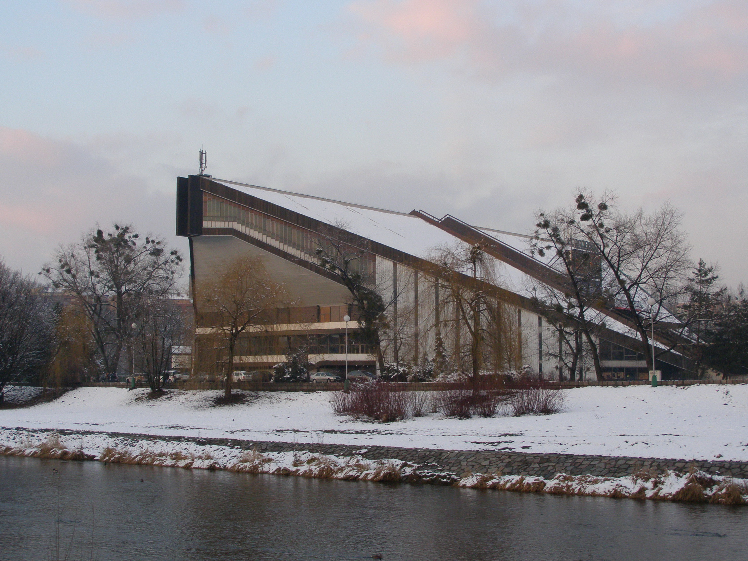 Frýdek, víceúčelová sportovní hala, břeh řeky Ostravice